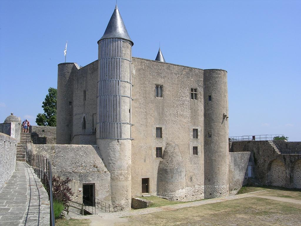 Description: Chateau de Noirmoutier, face source: Photos de vacances Licence